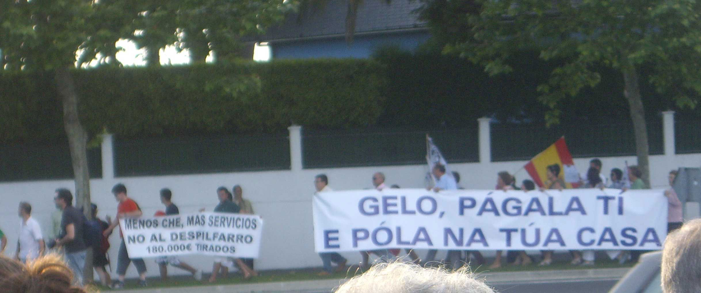 Manifestación día anterior á inauguración Che Guevara Oleiros Galiza